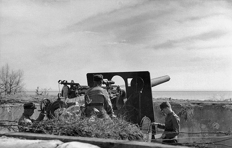 Rautaveräjän 120 mm:n Vickers-tykkiryhmä jatkosodan aikana (SA-kuva).